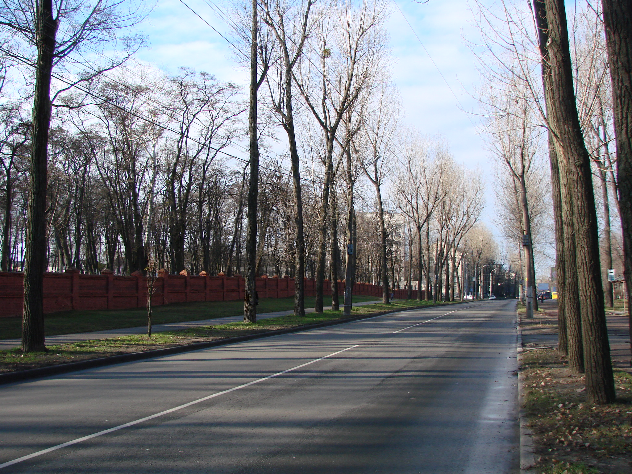 вулиця Дорогожицька